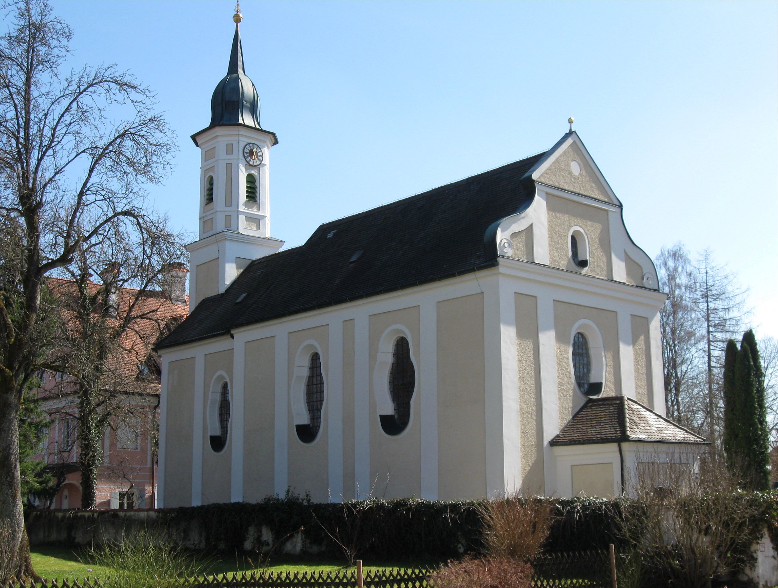 Kreuzpullach; Kath. Wallfahrtskirche Hl. Kreuz, barocker Neubau 1710 von Philipp Köglsperger; mit Ausstattung; Friedhof mit Ummauerung; bildet mit Haus Nr. 5 eine Baugruppe.